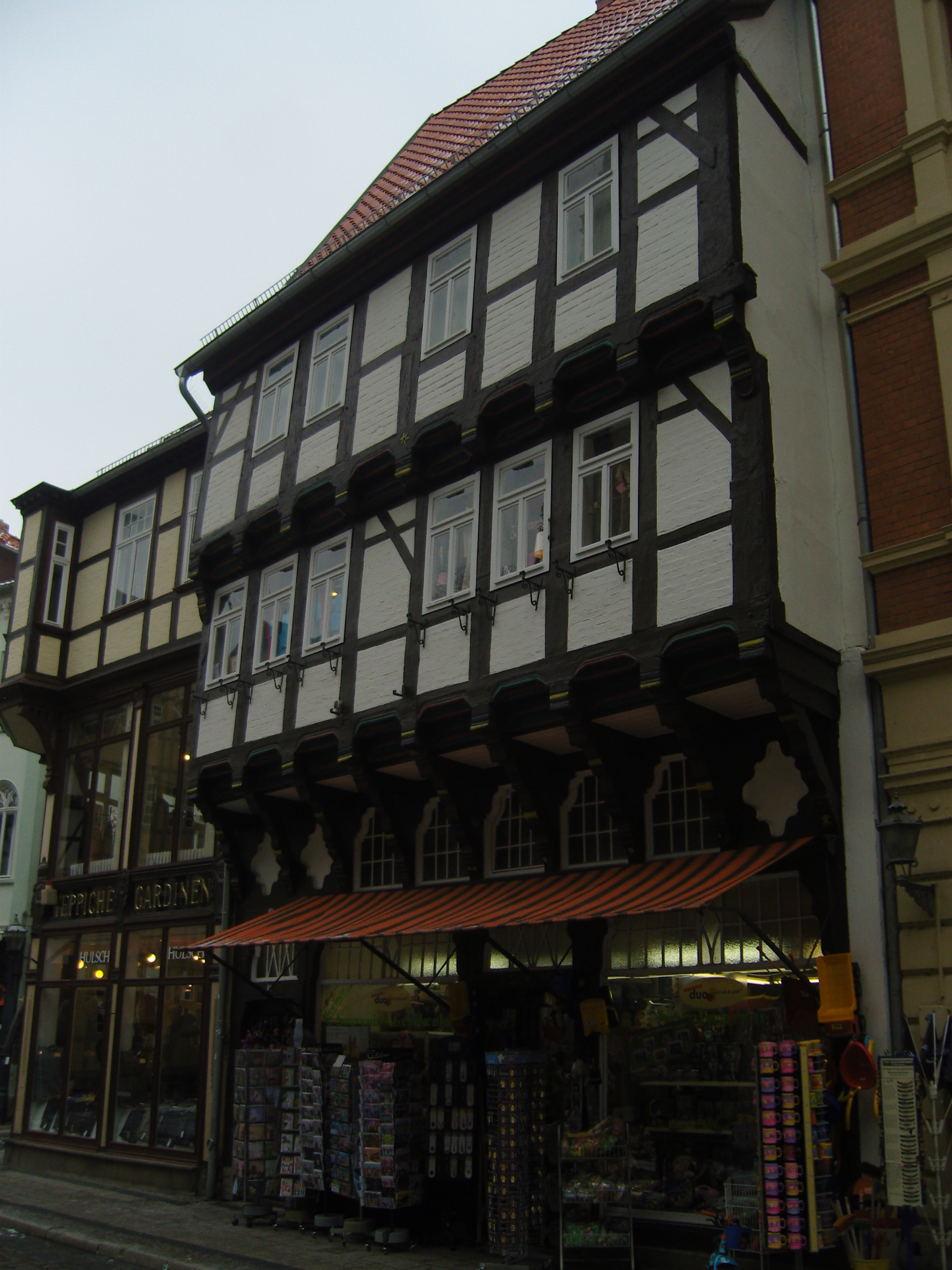 Denkmalgeschütztes Wohnhaus in der Breiten Straße 49 in Quedlinburg